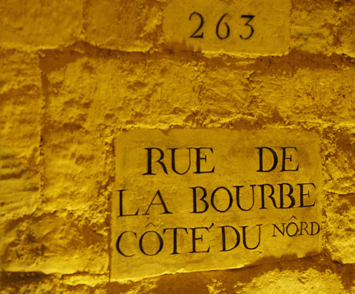 Carrières des Capucins, Paris, France.